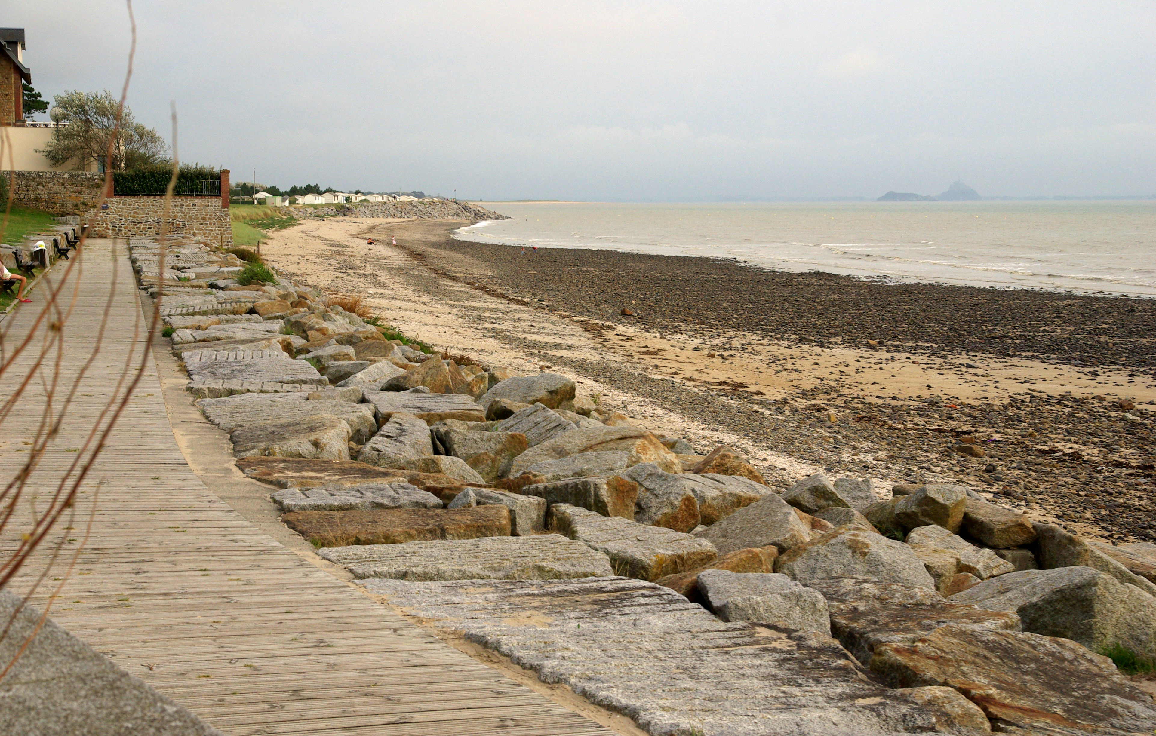 La côte de St Jean-le-Thomas avec vue sur le Mont St Michel et le rocher de Tombelaine.